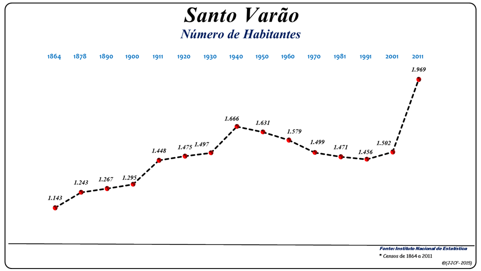 População